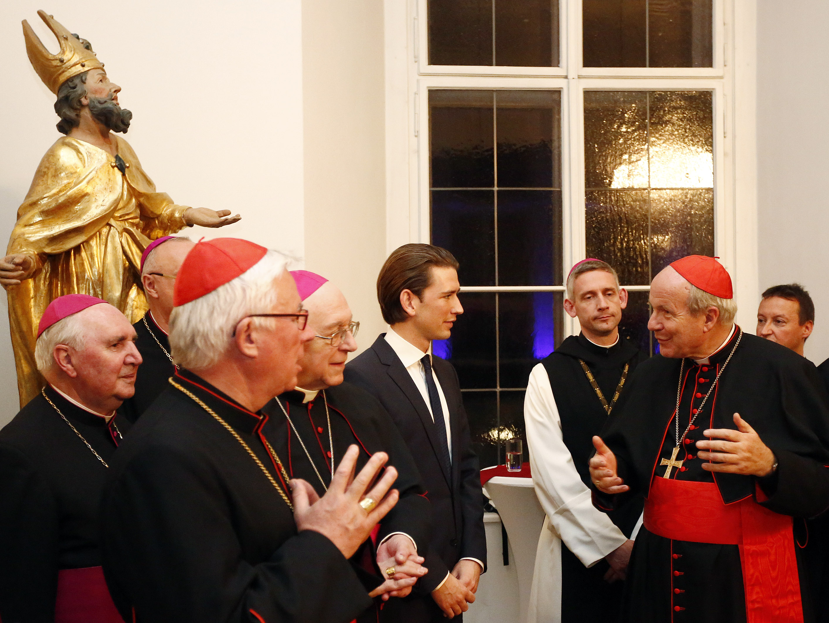 Bundesminister Sebastian Kurz im Rahmen der Bischofskonferenz. Wien, 04.11.2014, Foto: Dragan Tatic